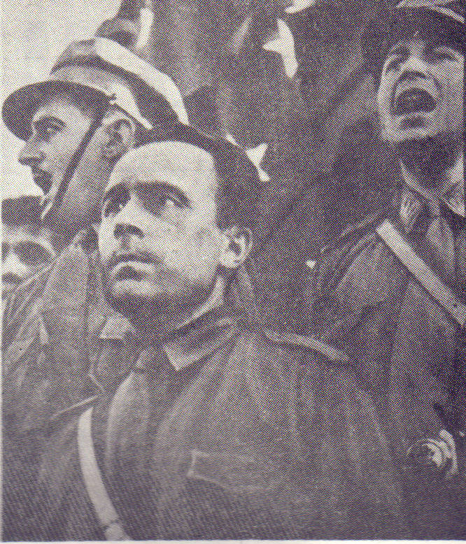 Jorge González von Marées (Santiago, 5 de abril de 1900 - Santiago, 14 de marzo de 1962), político chileno. Fundador y principal líder del Movimiento Nacional-Socialista de Chile, fue electo diputado entre 1937 y 1945.